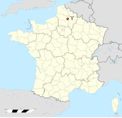 Un pequeno mapa.